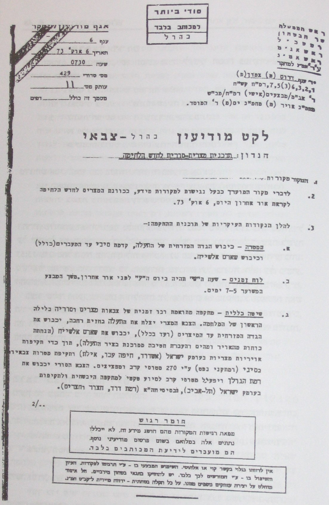 לקט מודיעין מיוחד שהוציאה אמ"ן/מחקר על בסיס ההתרעה שהתקבלה מאשרף מרואן. הלקט הופץ לצרכנים ב-6 באוקטובר 1973, בשעה 07:30, שש וחצי שעות לפני פרוץ מלחמת יום הכיפורים.